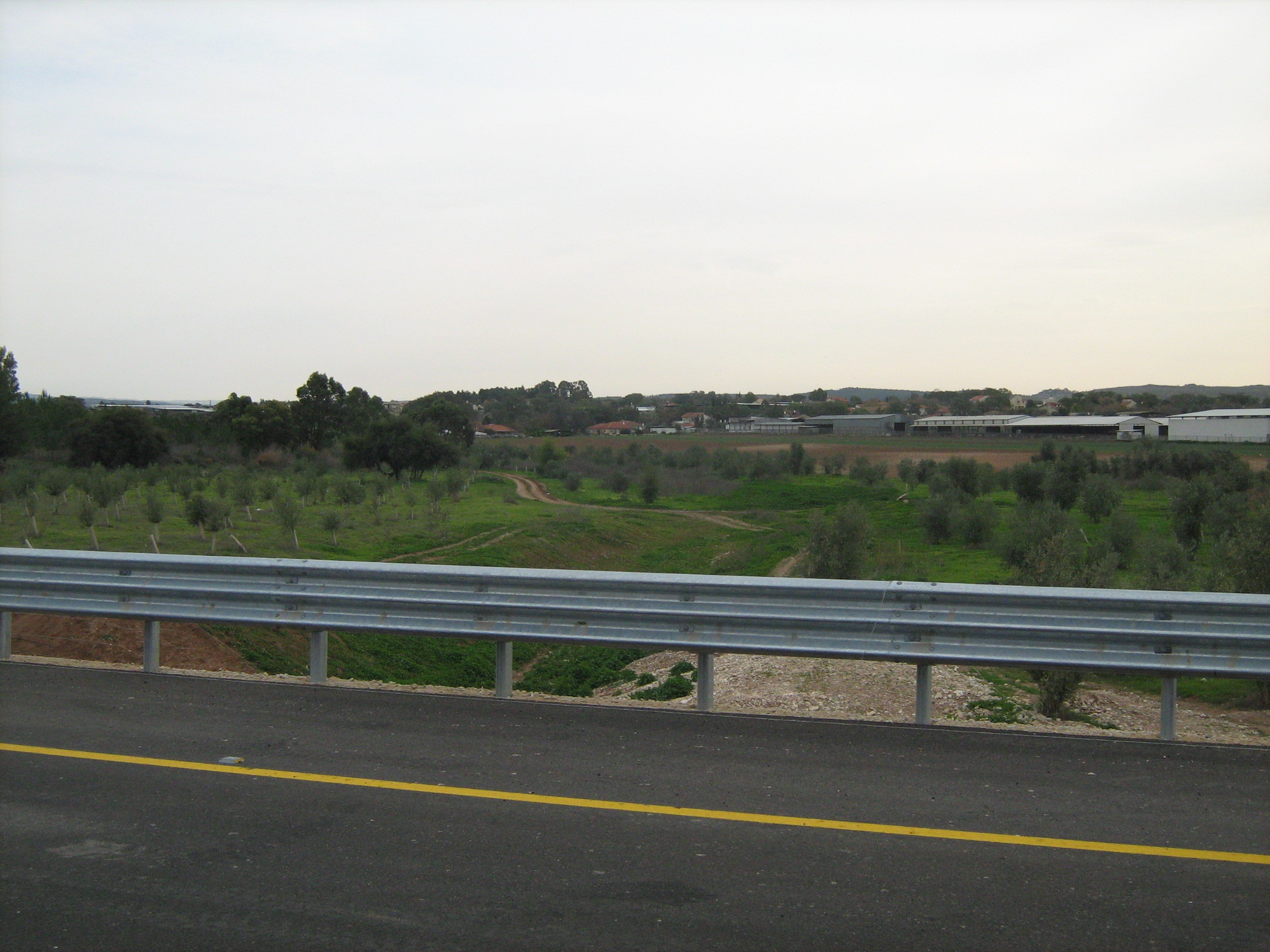 כפר שמואל מכביש 431